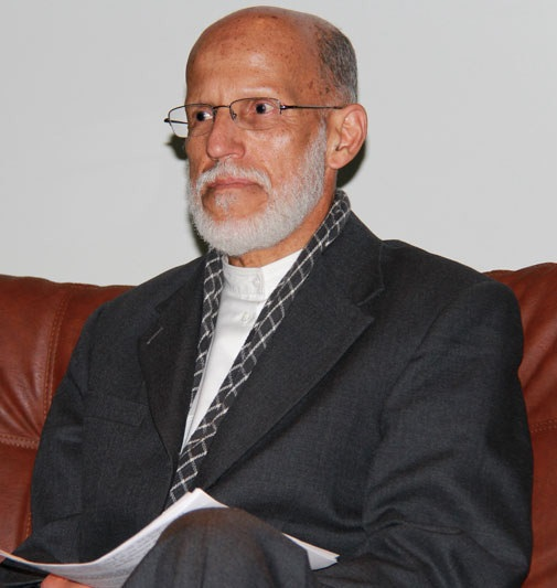 Juventino Muhammad Sadiq